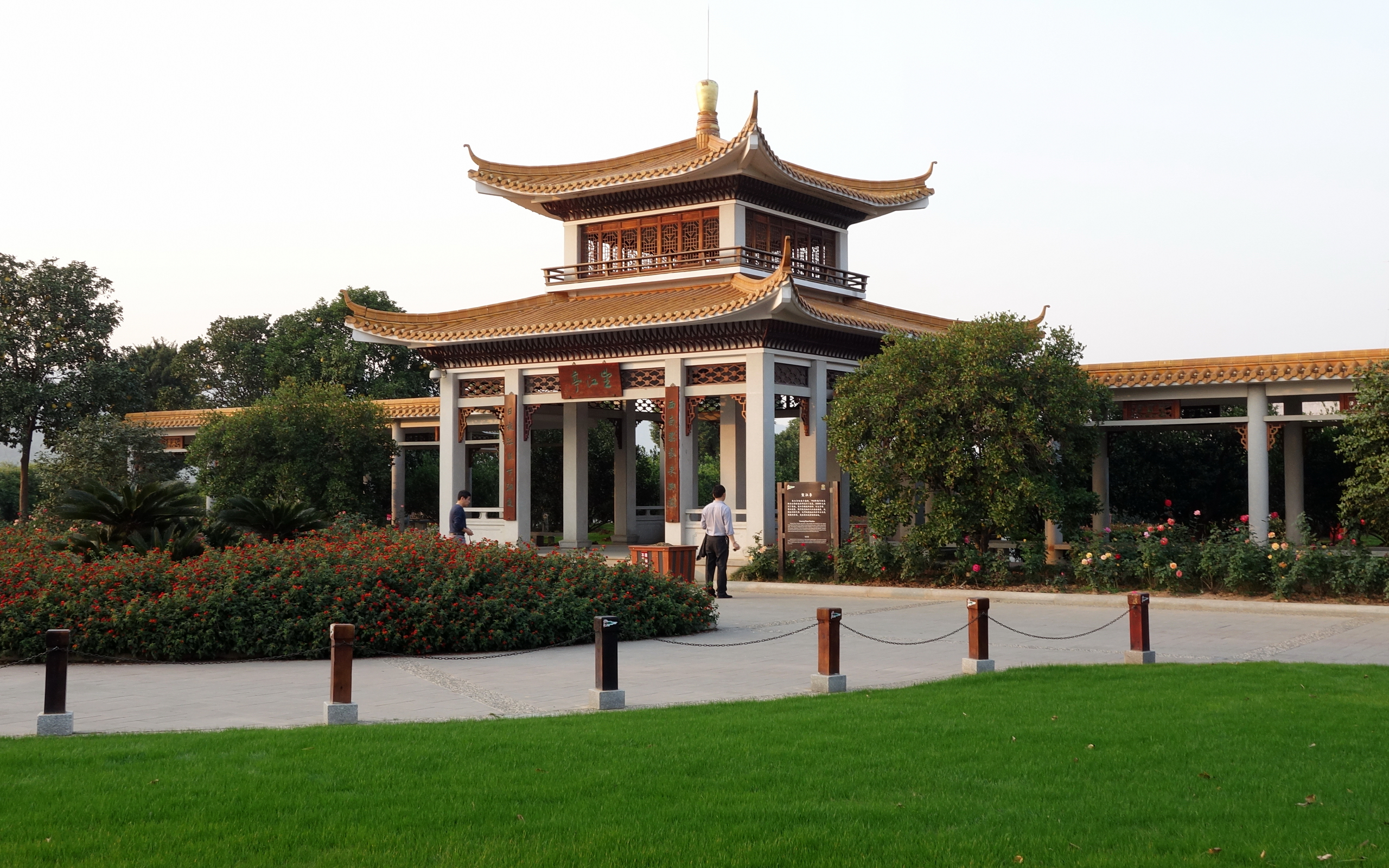 长沙橘子洲头望江亭